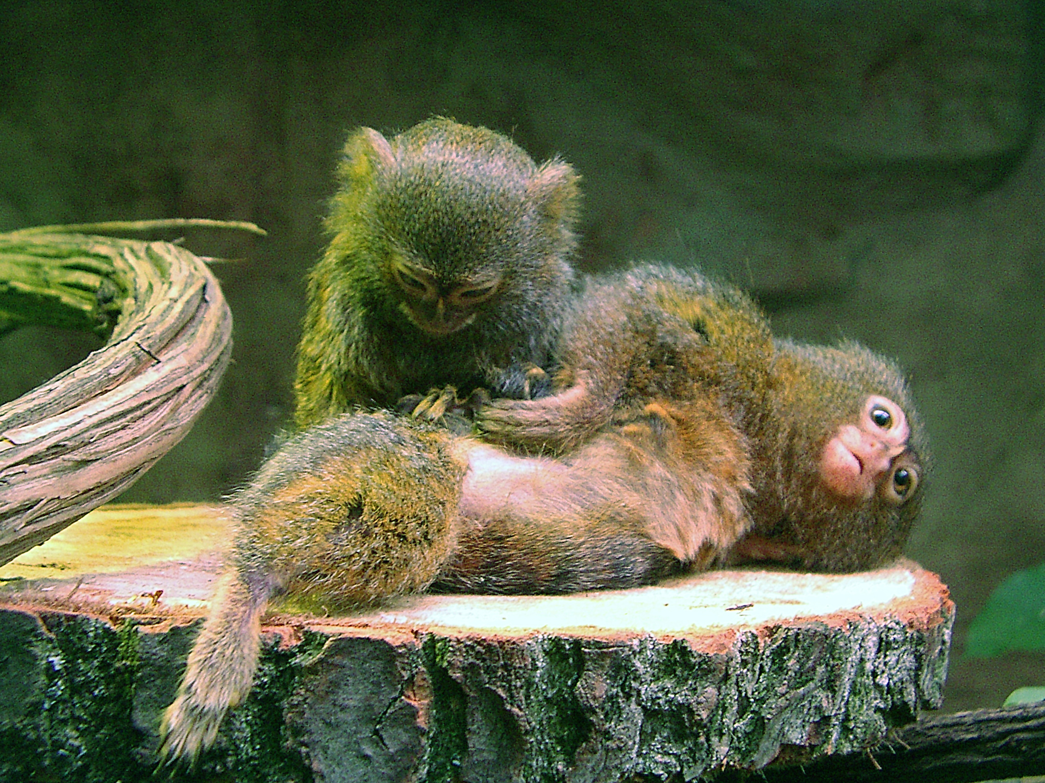 Pigmejki w warszawskim ZOO, poprawiona komputerowo kolorystyka.